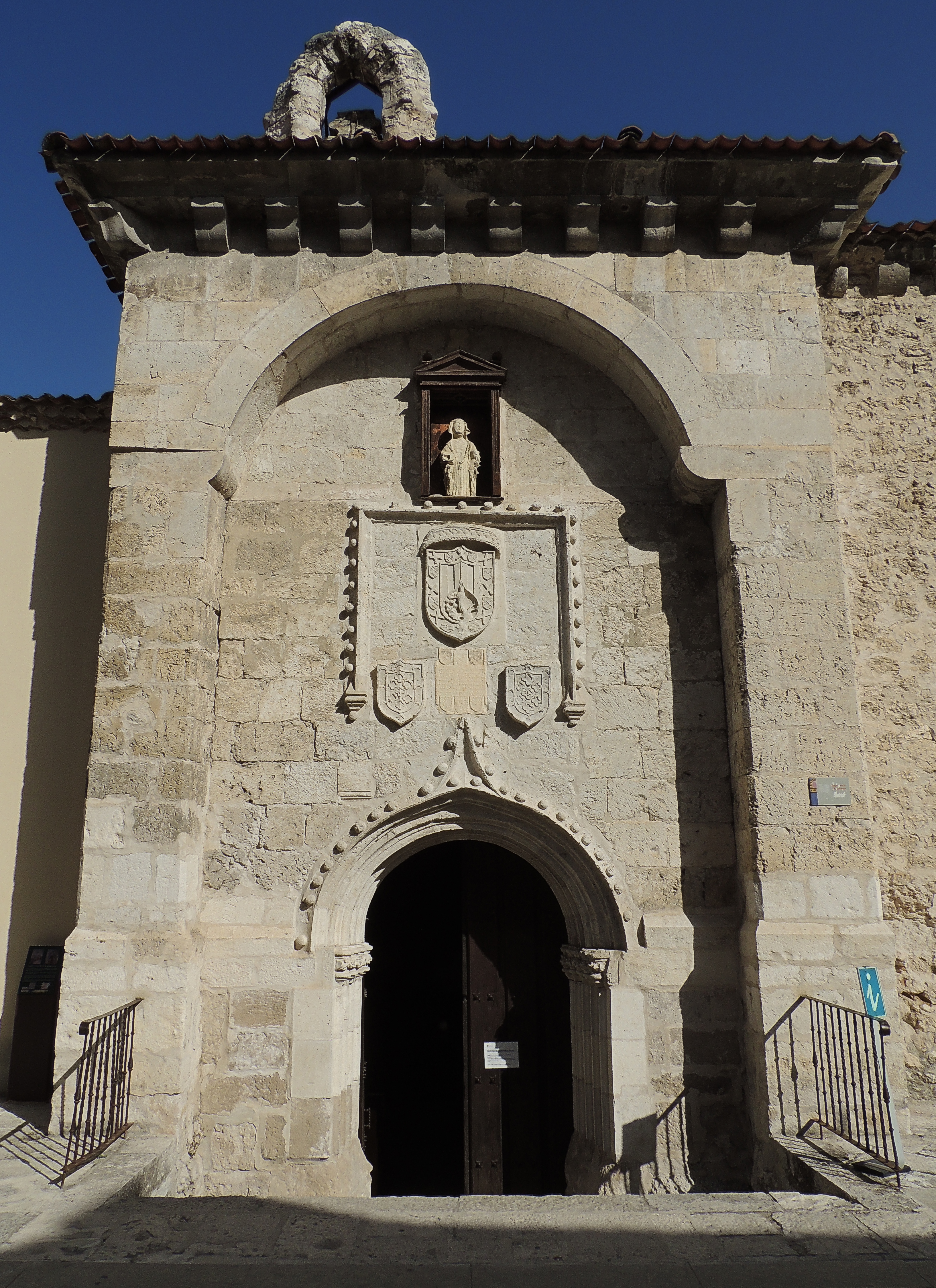 Portada de la capilla de La Magdalena en Cuéllar